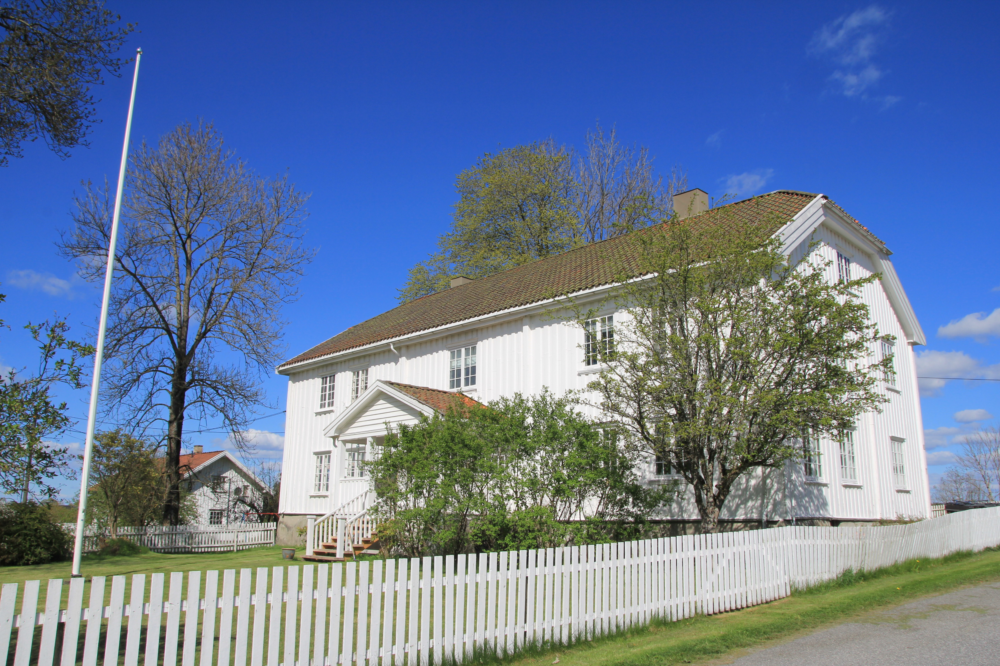 Skiptvet prestegård